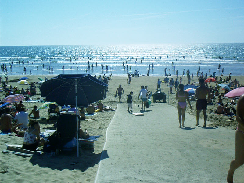 Grand Village Plage bei Flut